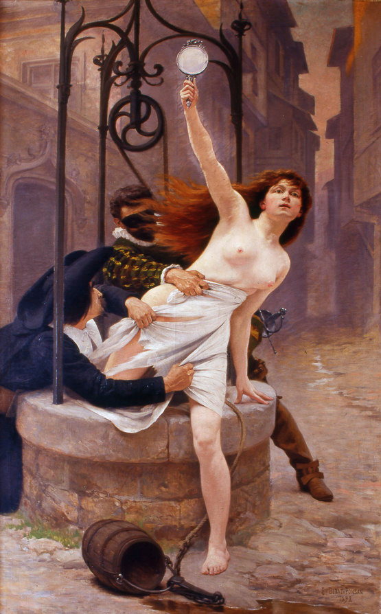 Tableau dreyfusard.